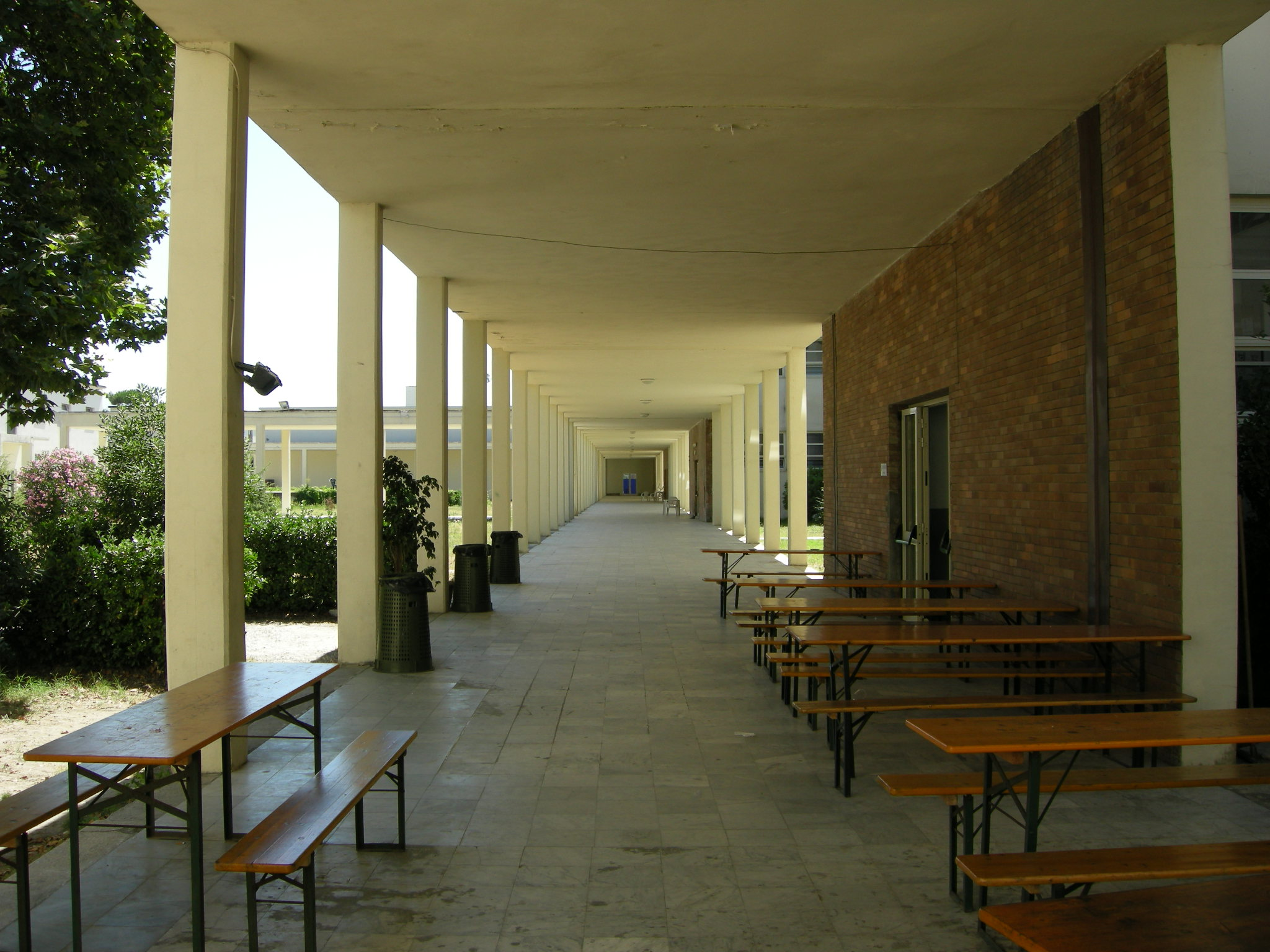 Colonia Torino, corridoio loggiato